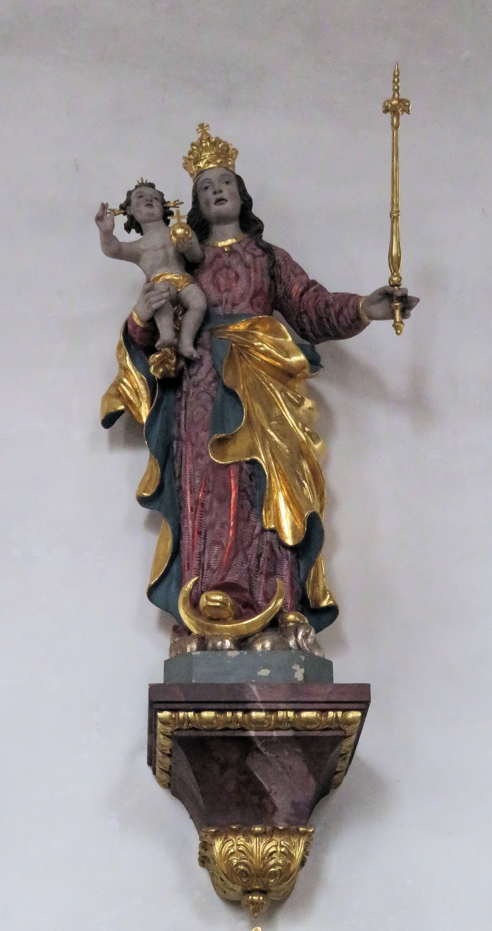 St. Peter und Paul in Hopfen am See ist eine barockisierte Kirche, deren Ursprünge wohl auf das 11. Jh. zurückgehen. Sie enthält gotische Fresken und Malereien von Claudius Schraudolph dem Älteren sowie Stuck von Joseph Fischer aus Faulenbach.